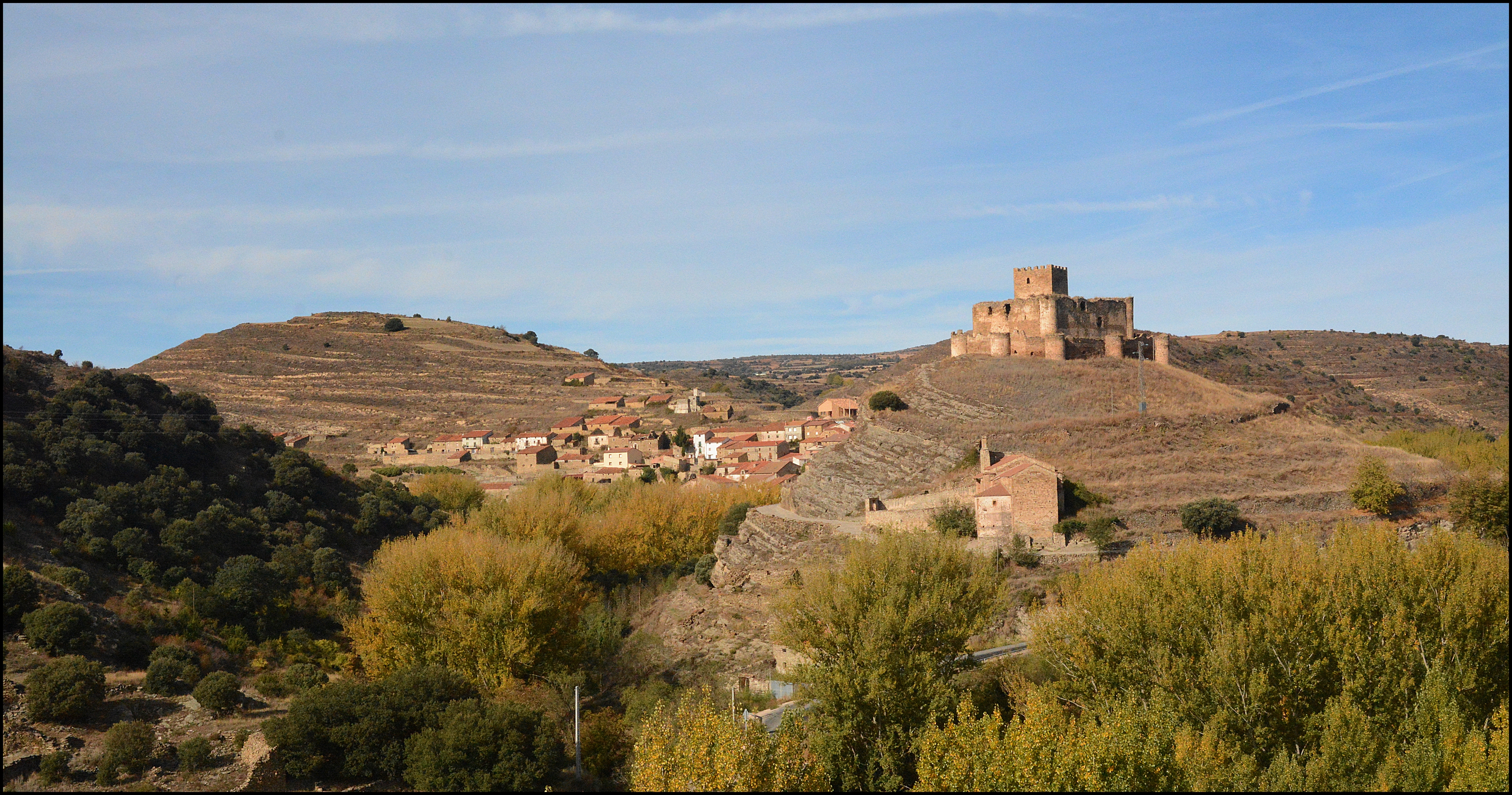 Castillo de Magaña, Soria.